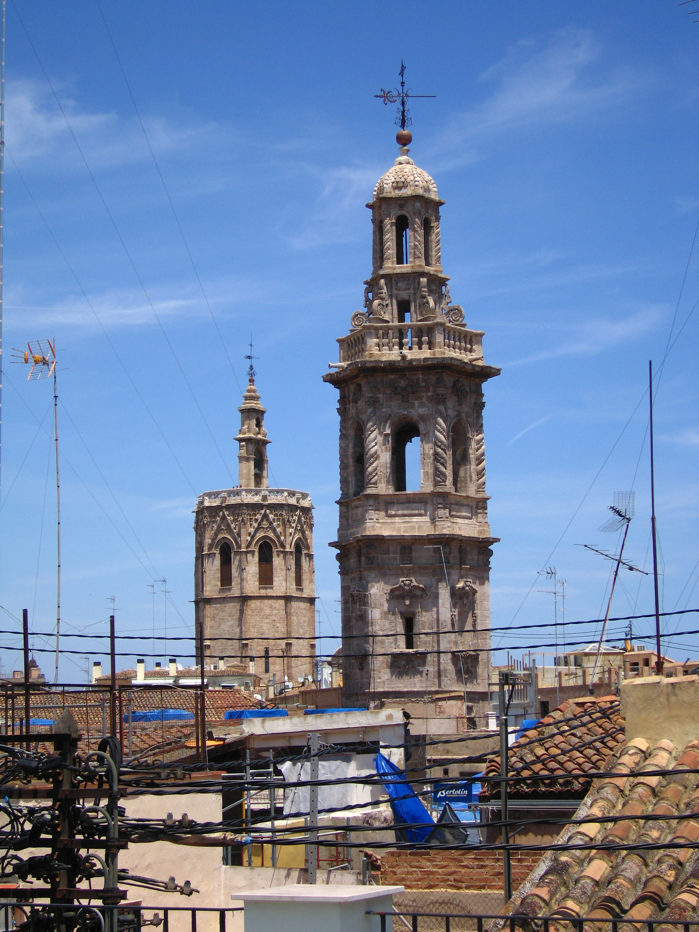 campanars del Micalet i Santa Caterina (València)